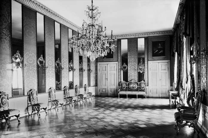 Spiegelsaal im Schloss